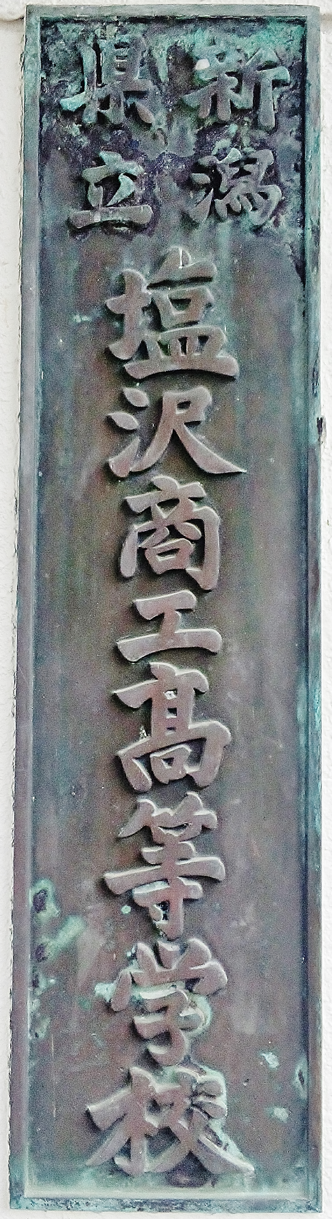 新潟県立塩沢商工髙等学校・学校表示